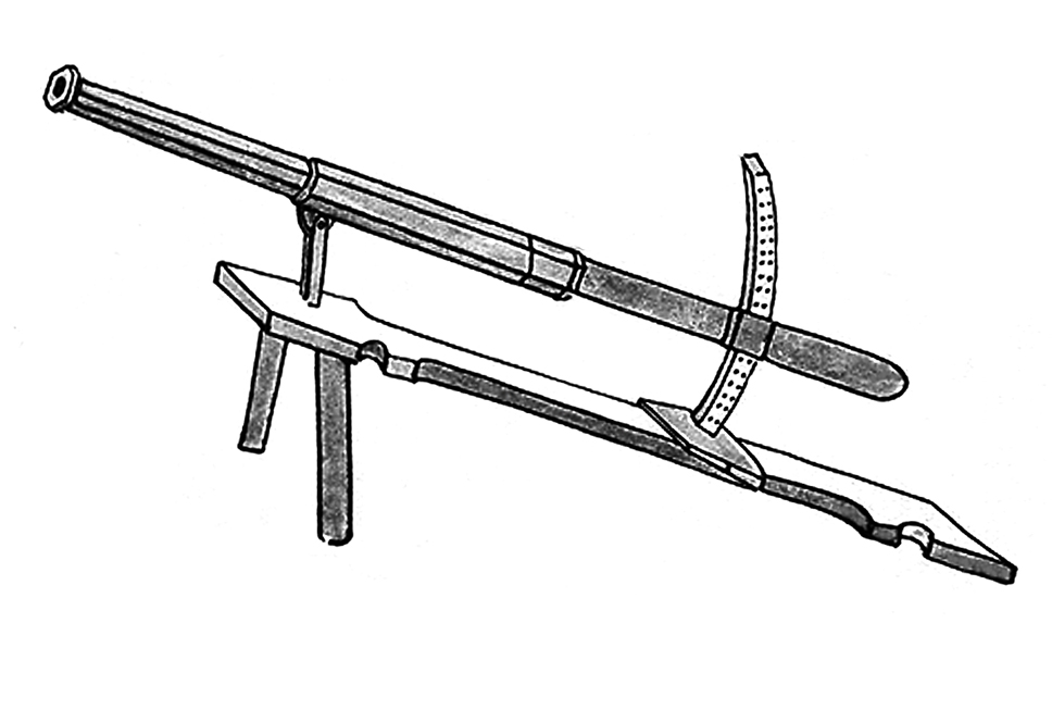 Husitská tarasnice